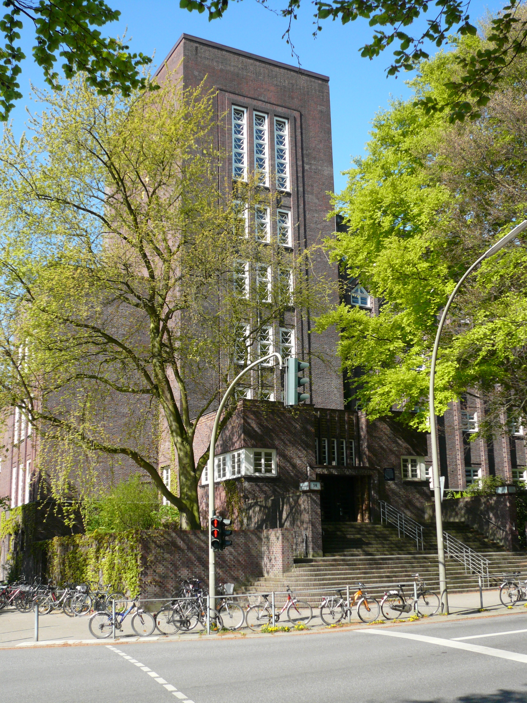 Gesamtschule Eppendorf -Högerbau Curschmannstraße- Eingang / Eckturm